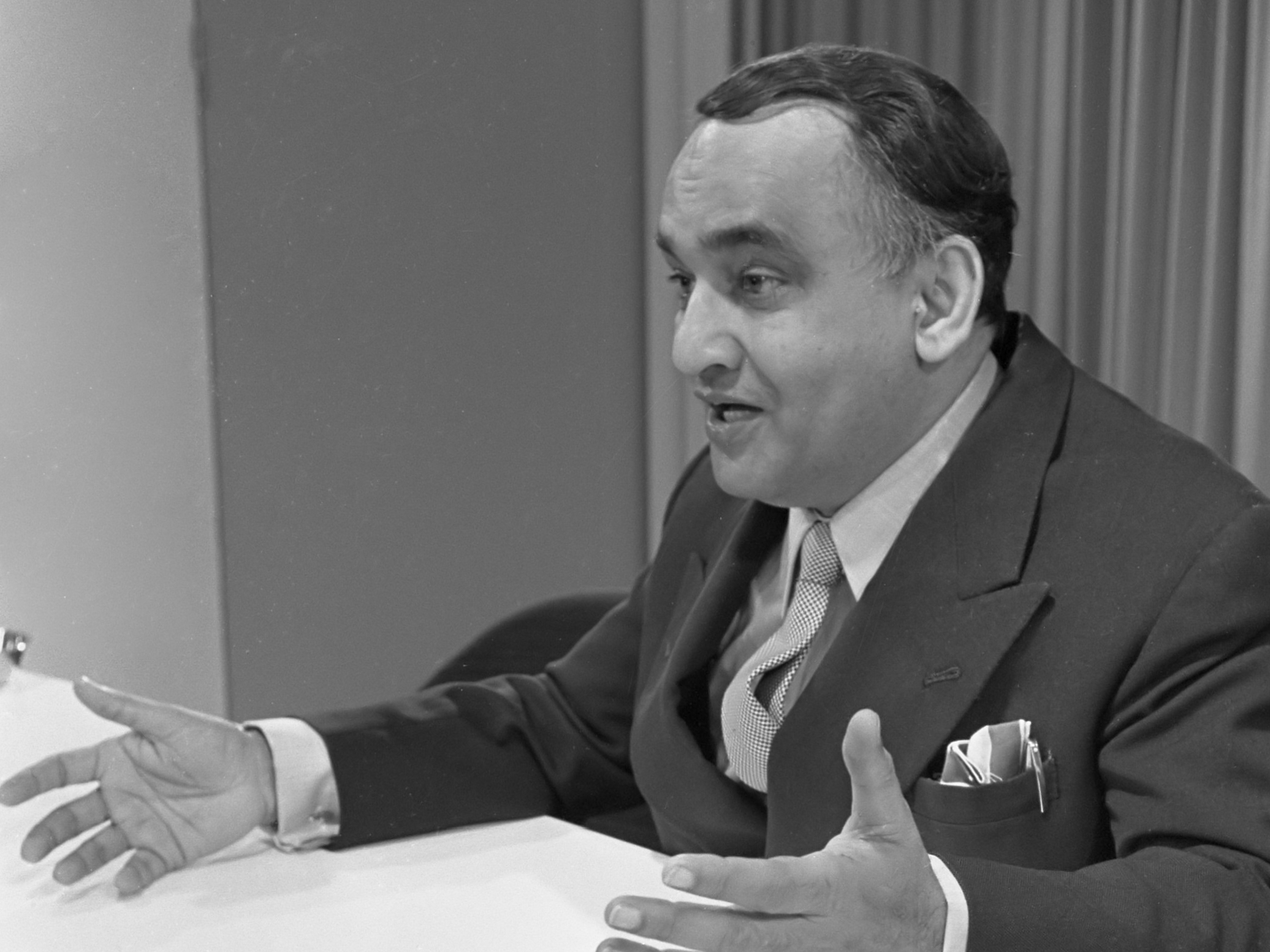 Aankomst Ambassadeur Brits-Guyana sir Lionel A. Luckloo Schiphol 18 januari 1968